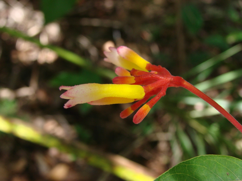 Palicourea marcgravii - RUBIACEAE Jardim Botânico de Brasília - Distrito Federal - Brasil